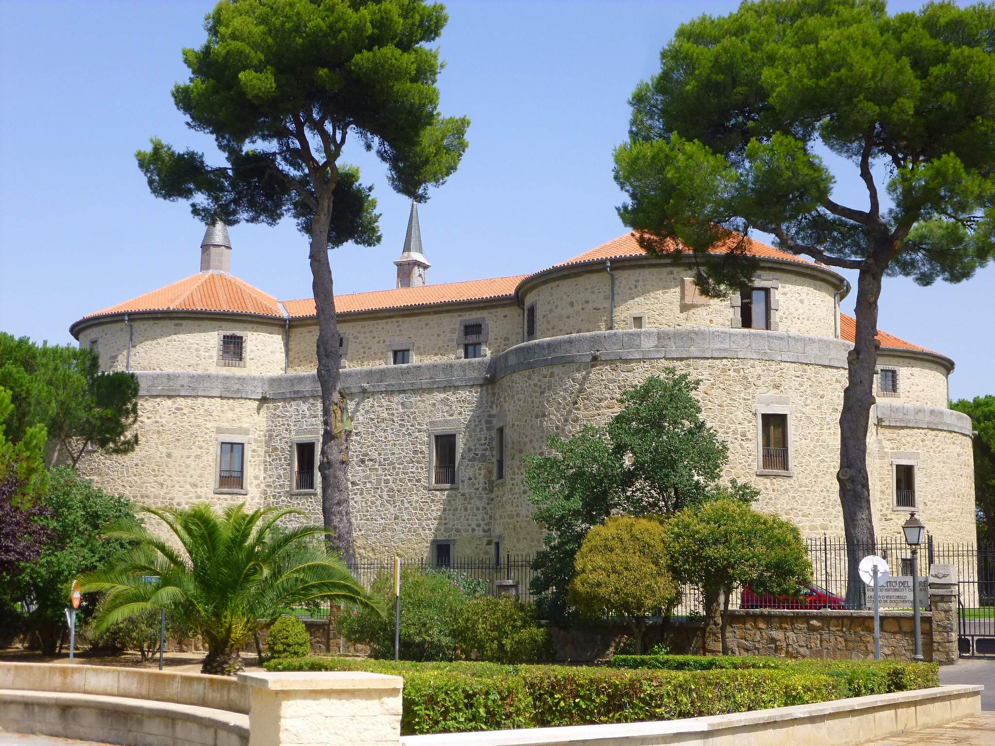 Villaviciosa de Odón - Castillo (sede del Archivo Histórico del Ejército del Aire, AHEA)